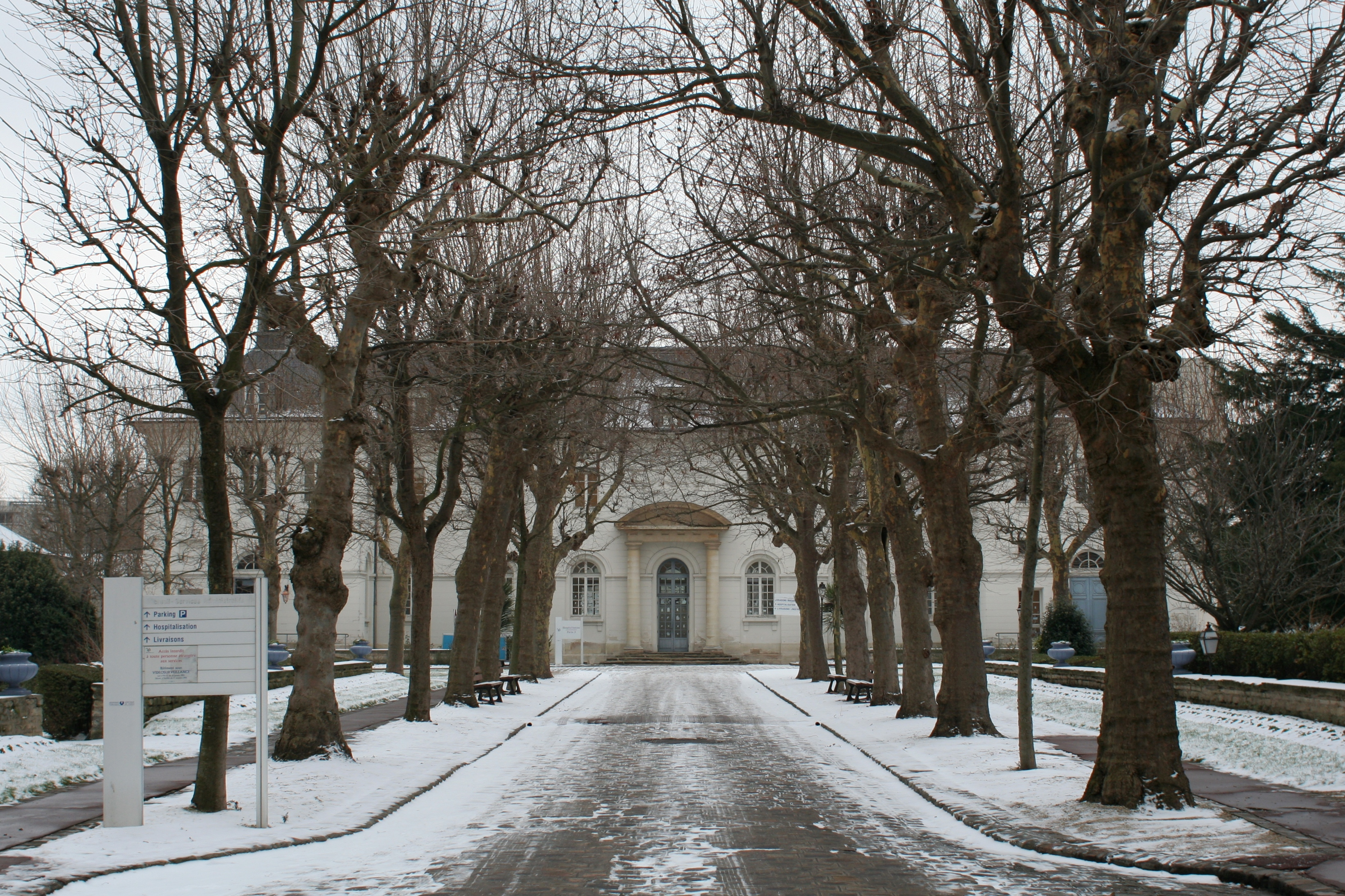 Ancien hospice de La Rochefoucauld, allée et façade. .